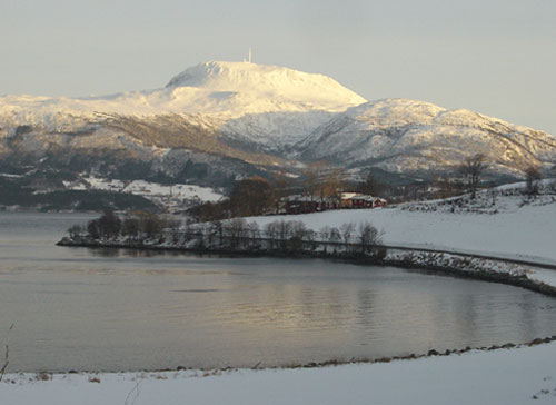 Reinsfjellet and Gjemnes in Norway.